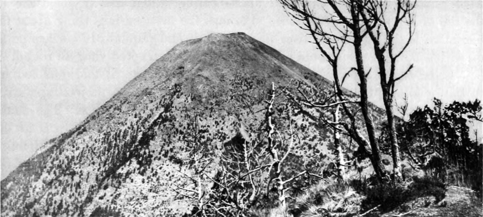 Volcán de Acatenango desde la meseta que lo divide del Volcán de Fuego.